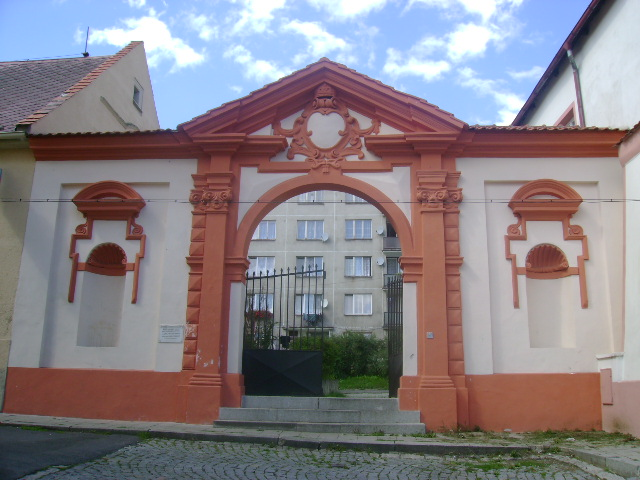 Zámecká brána do zrušeného zámku ve Žluticích